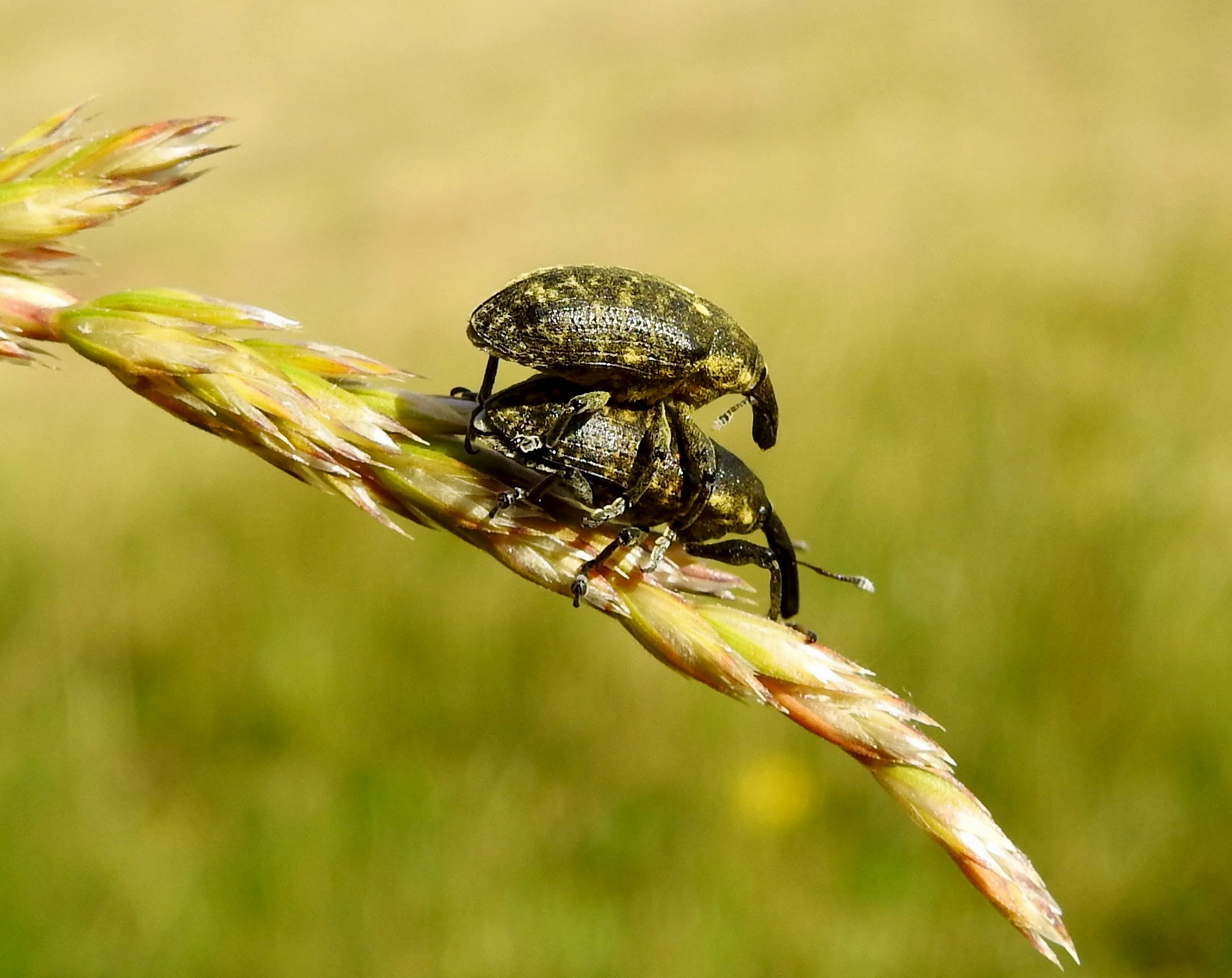 Andechs, OT Erling, Fichtenrüsselkäfer bei der Paarung im Naturschutzgebiet „Mesnerbichl“.